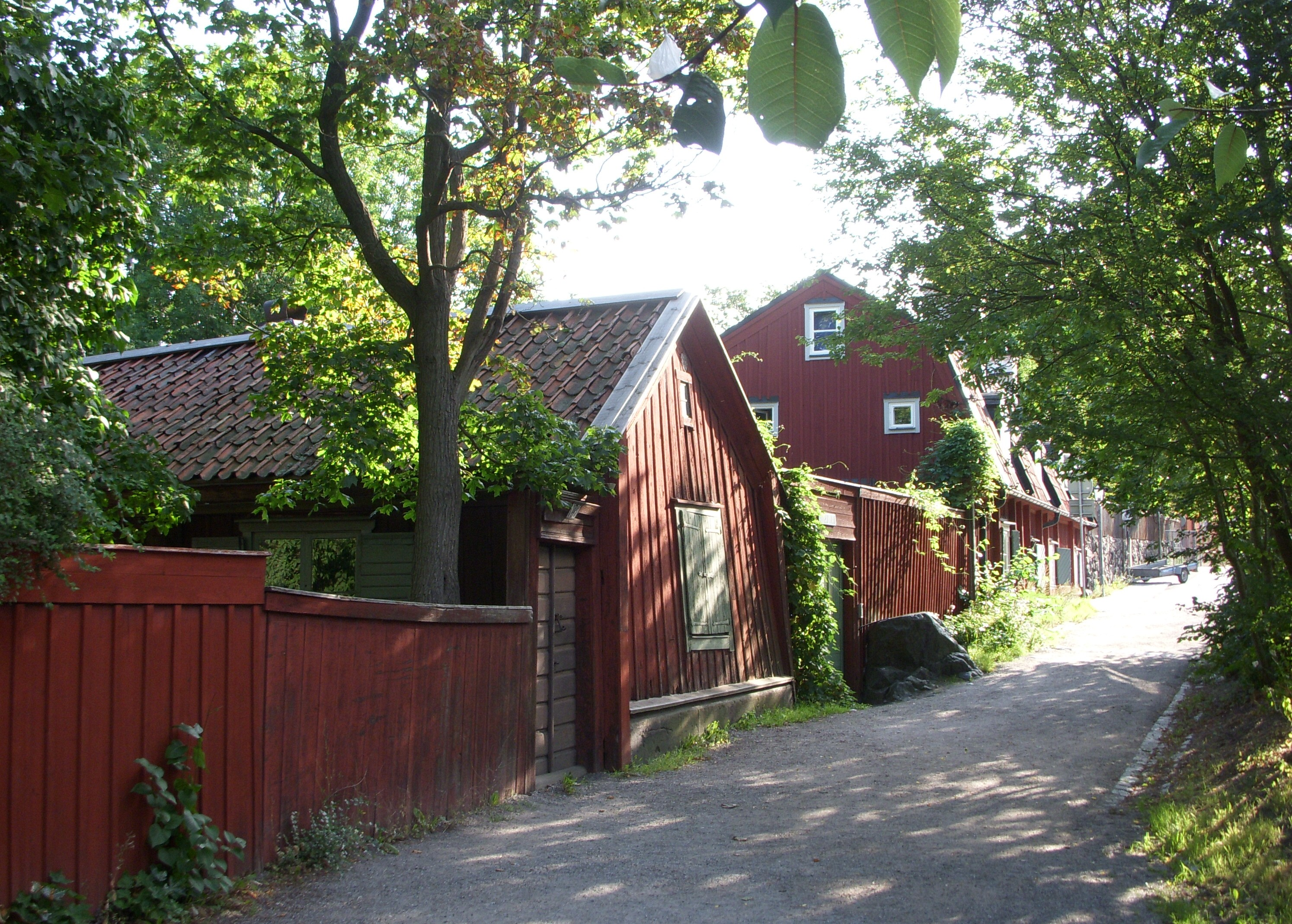 Stigbergsgatan 21 på Södermalm i Stockholm, det med lutande gavel är "Blockmakarens hus"